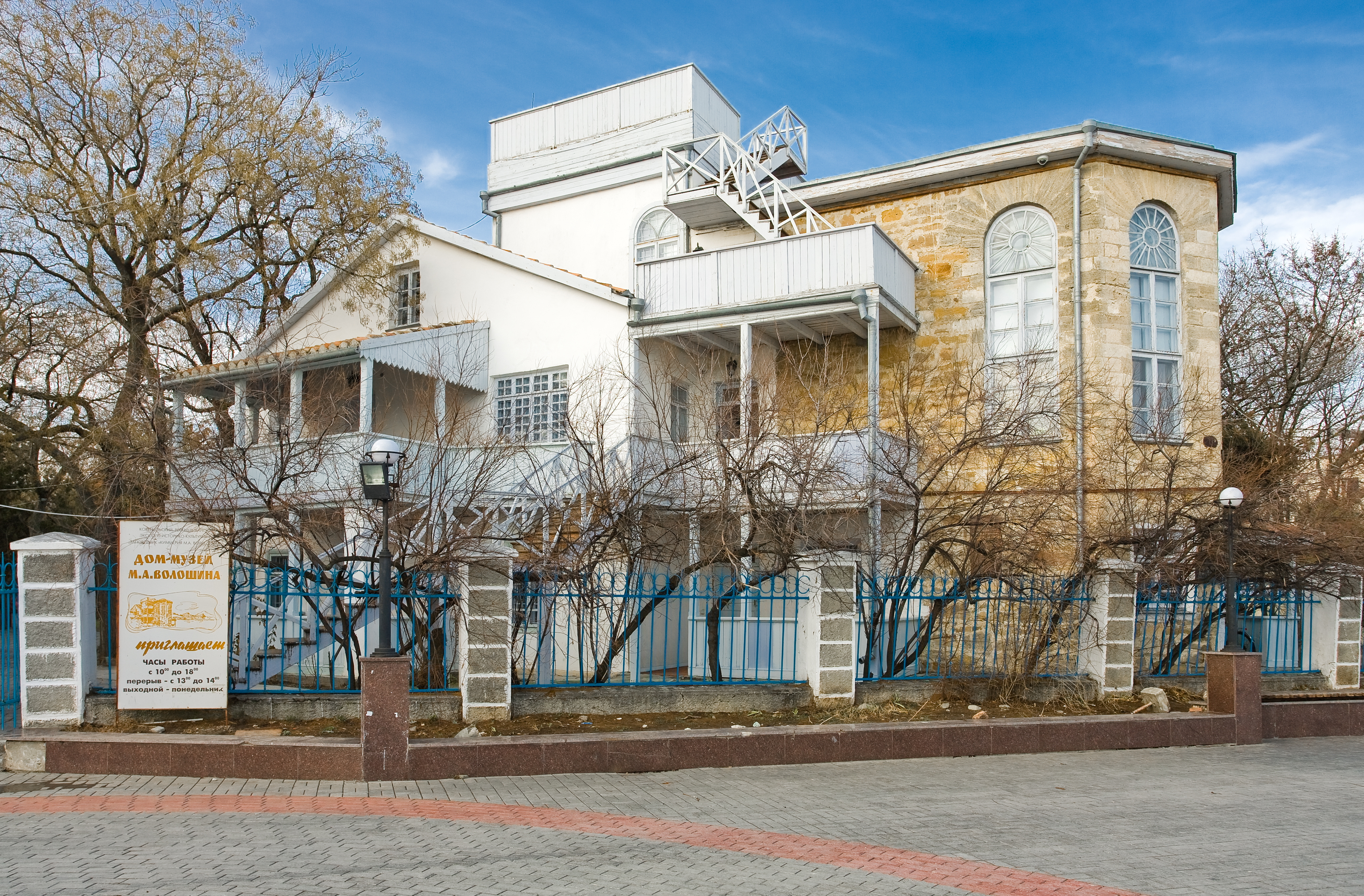 Будинок, у якому жив поет і художник М. О. Волошин смт Коктебель вул. Набережна